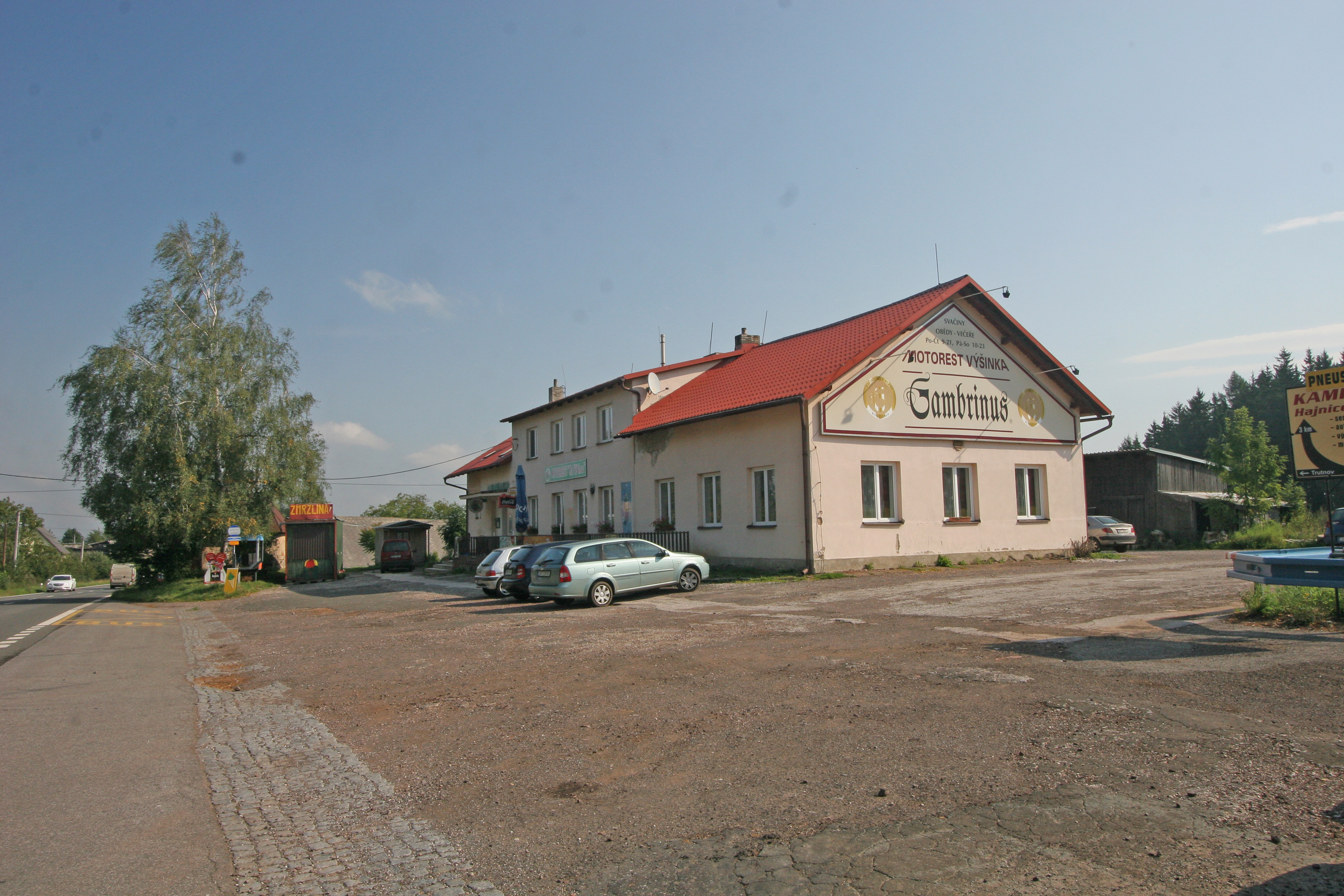 Výšinka motorest